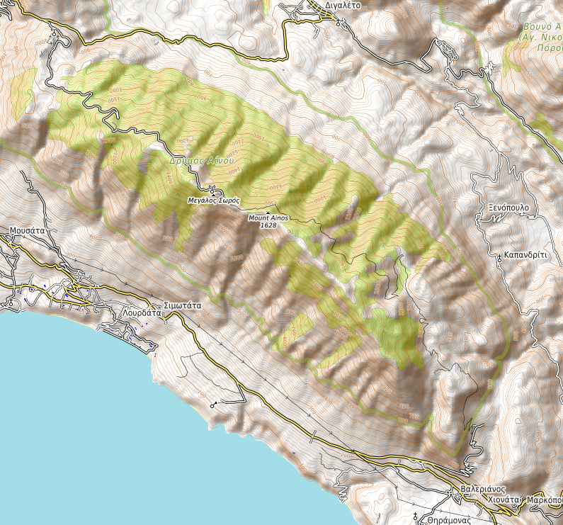 carte réalisée sur umap This map may be incomplete, and may contain errors. Don't rely solely on it for navigation.